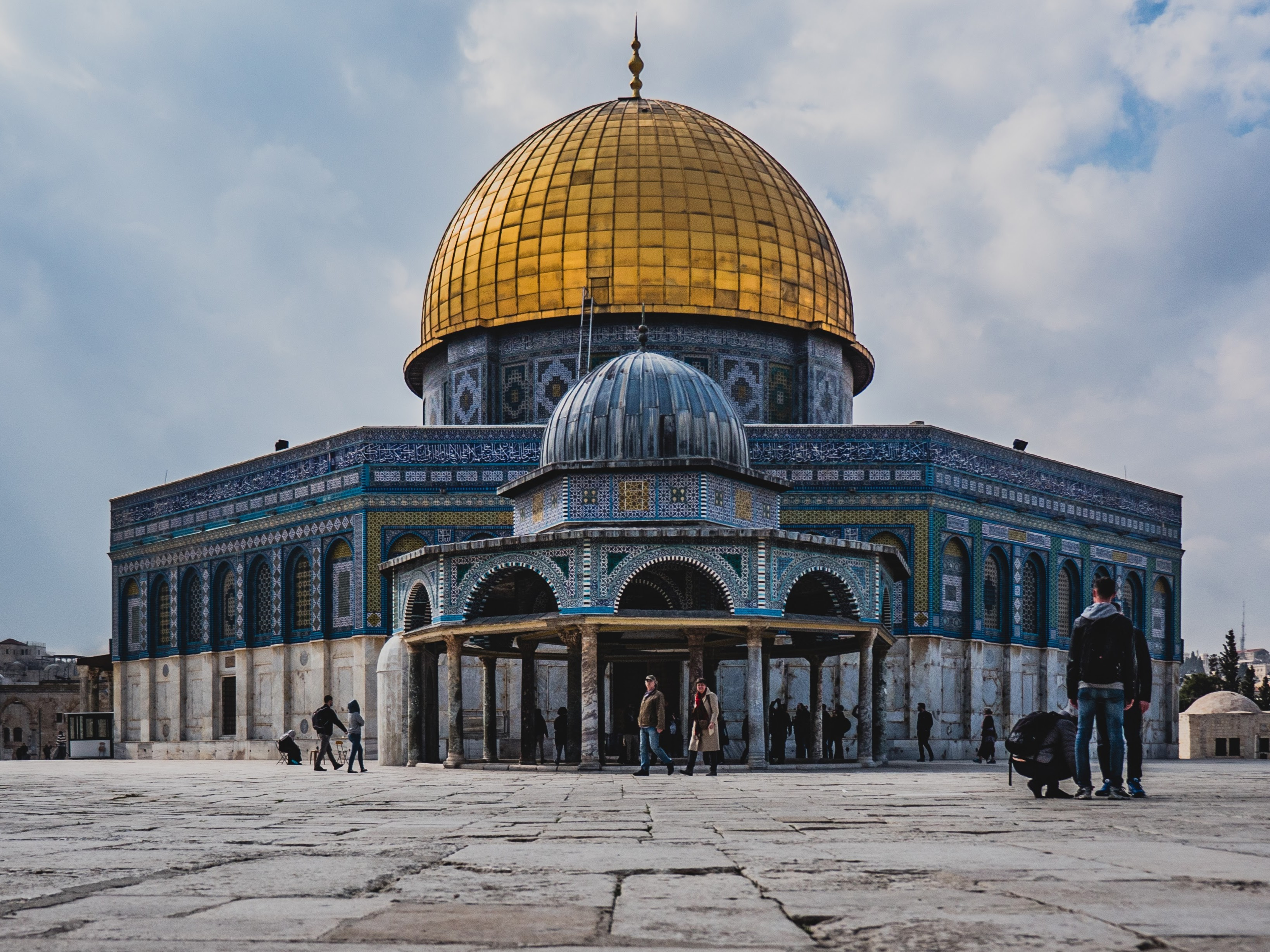 Dome du rocher en 2017 - Vue de Contre plonger